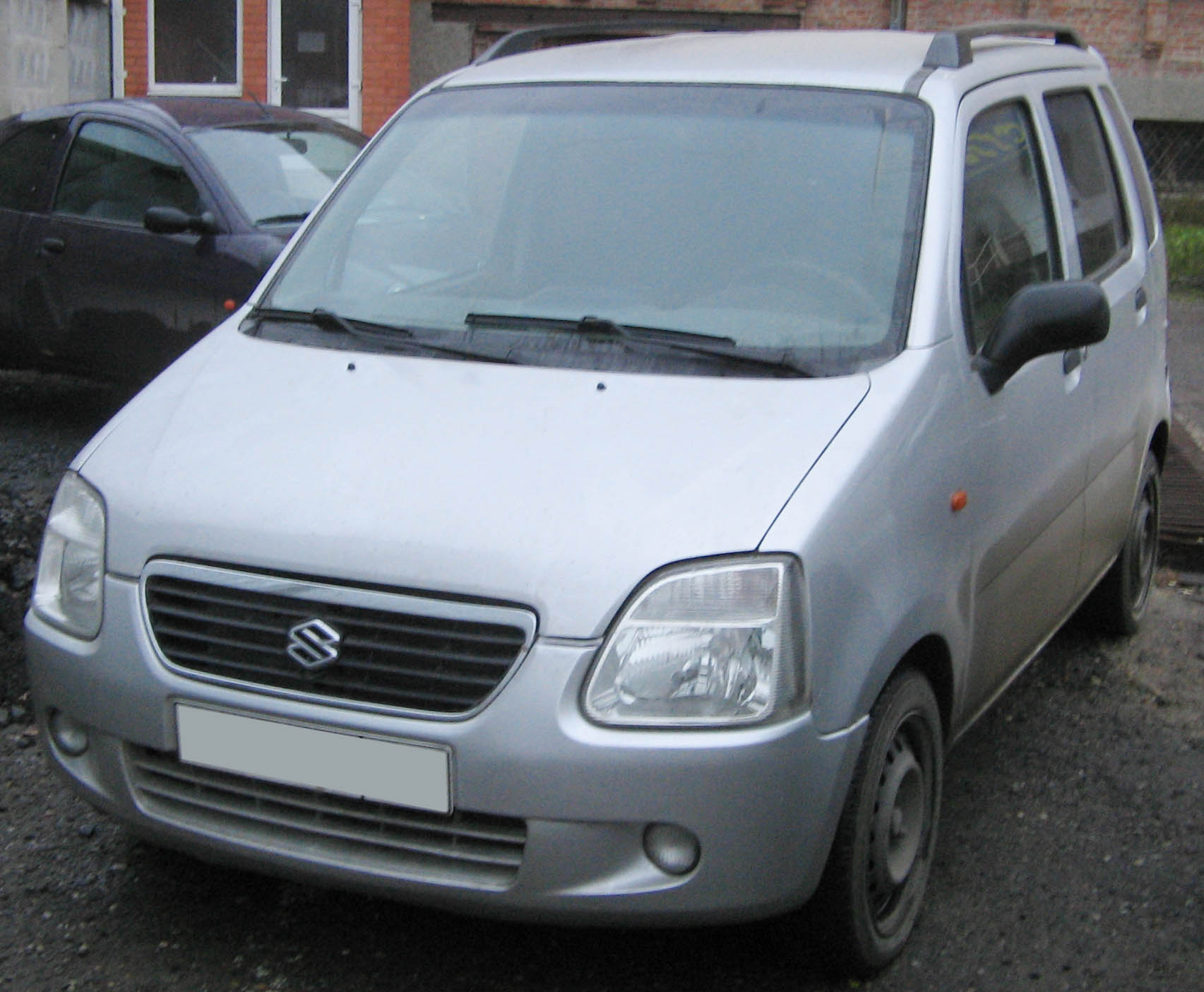 Suzuki Wagon R+ , второе поколение.